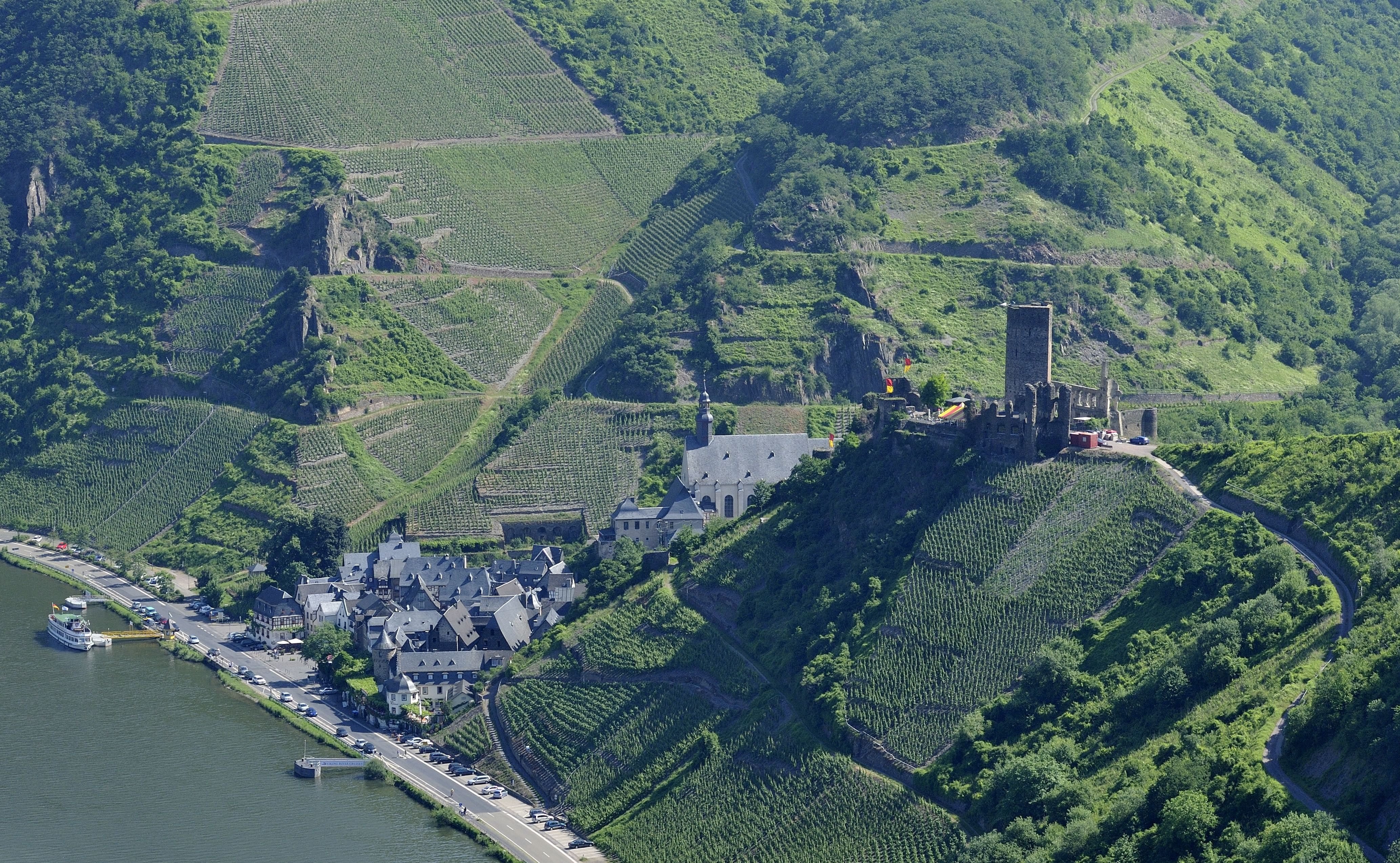 Beilstein/Mosel mit Burgruine Metternich - Blick von der "Briederner Waldeslust"